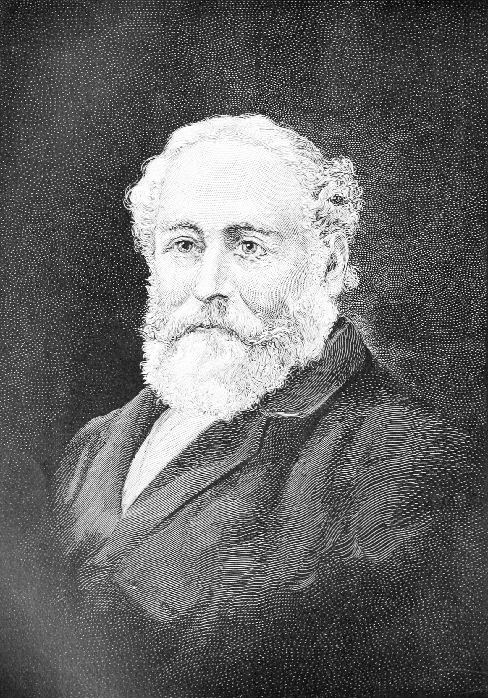 W. Mattieu Williams